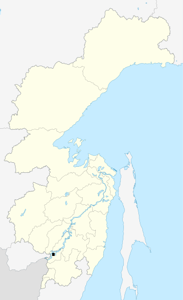 Posicion de la vila de Khabarovsk, al sud del krai.